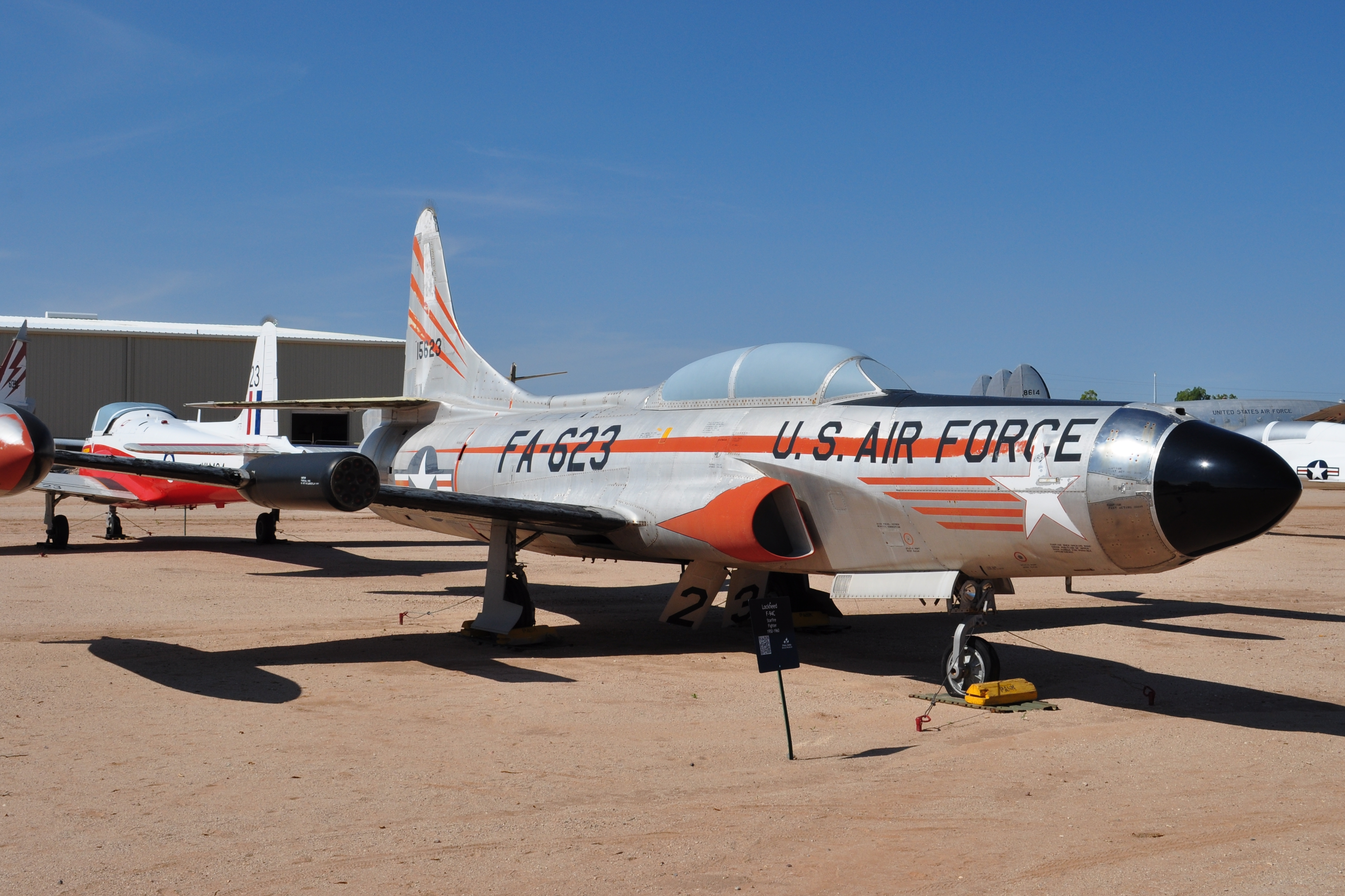 USAF PIMA